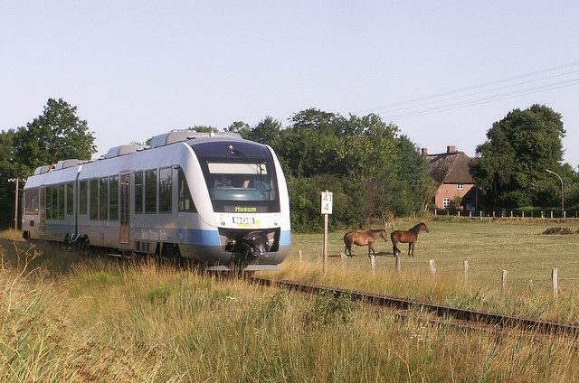 LINT in der Nähe des Bahnhofs St. Peter-Süd